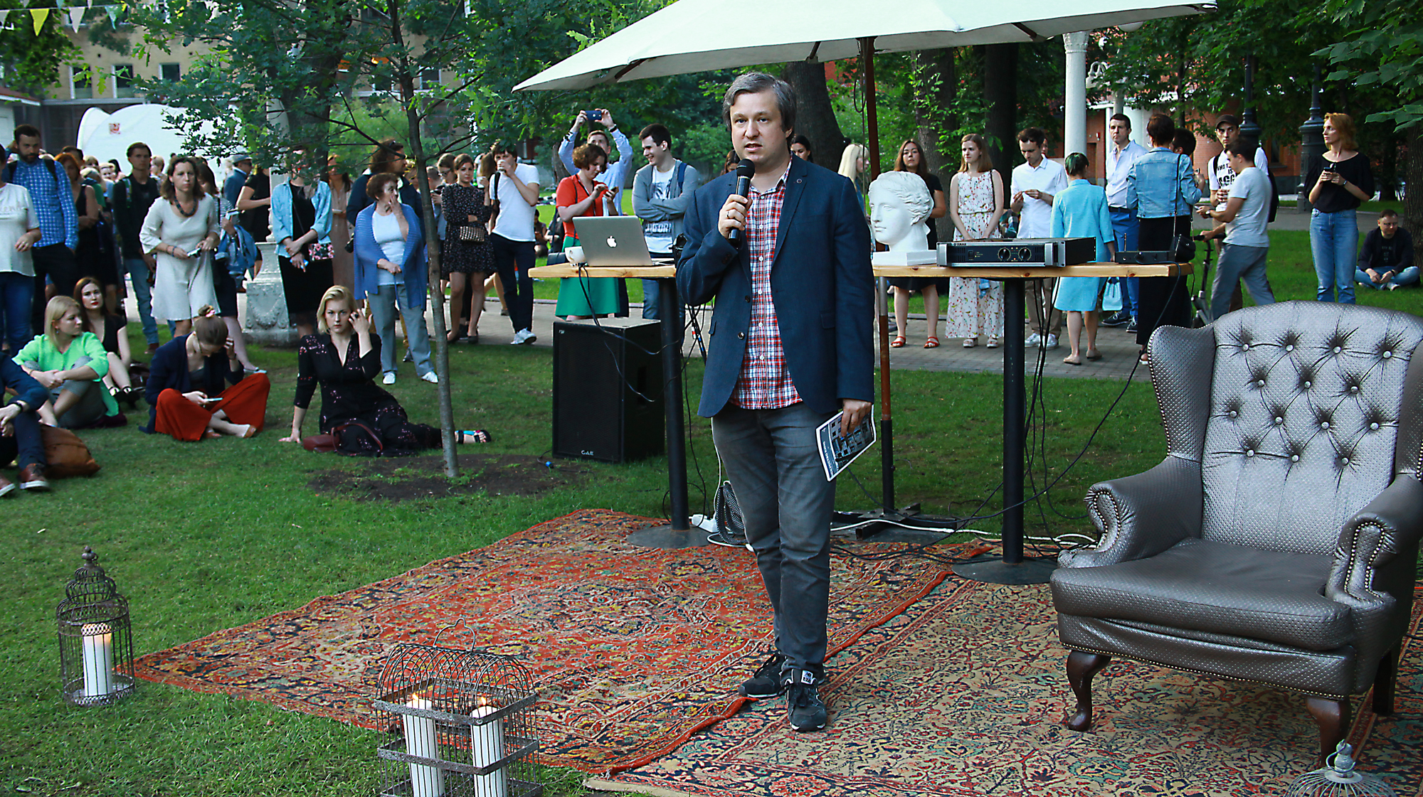 Встреча нового главреда "Искусства кино" с читателями журнала в саду Эрмитаж